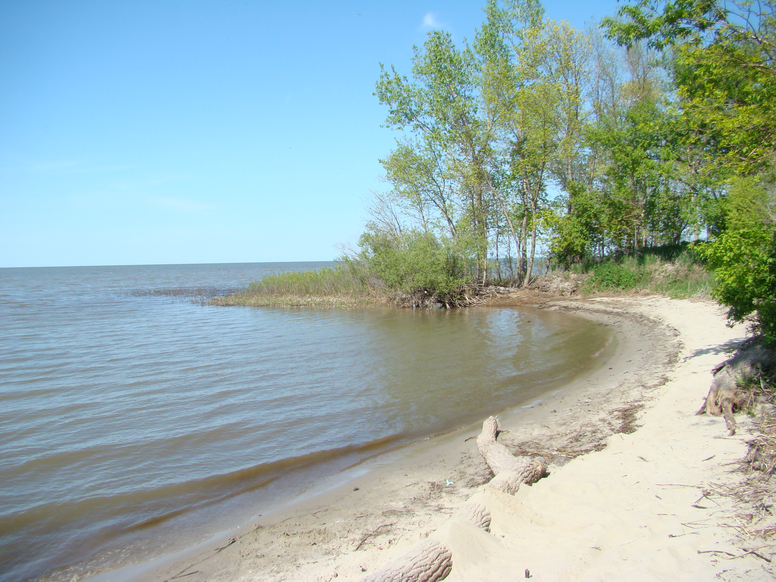 Delta Beach Manitoba Canada